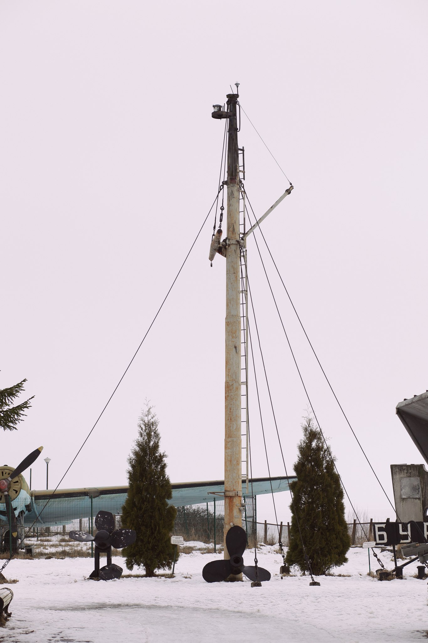 Мачта канонерской лодки "Бира". Установлена в музее "Дорога жизни" в поселке Ладожское озеро Ленинградской области.